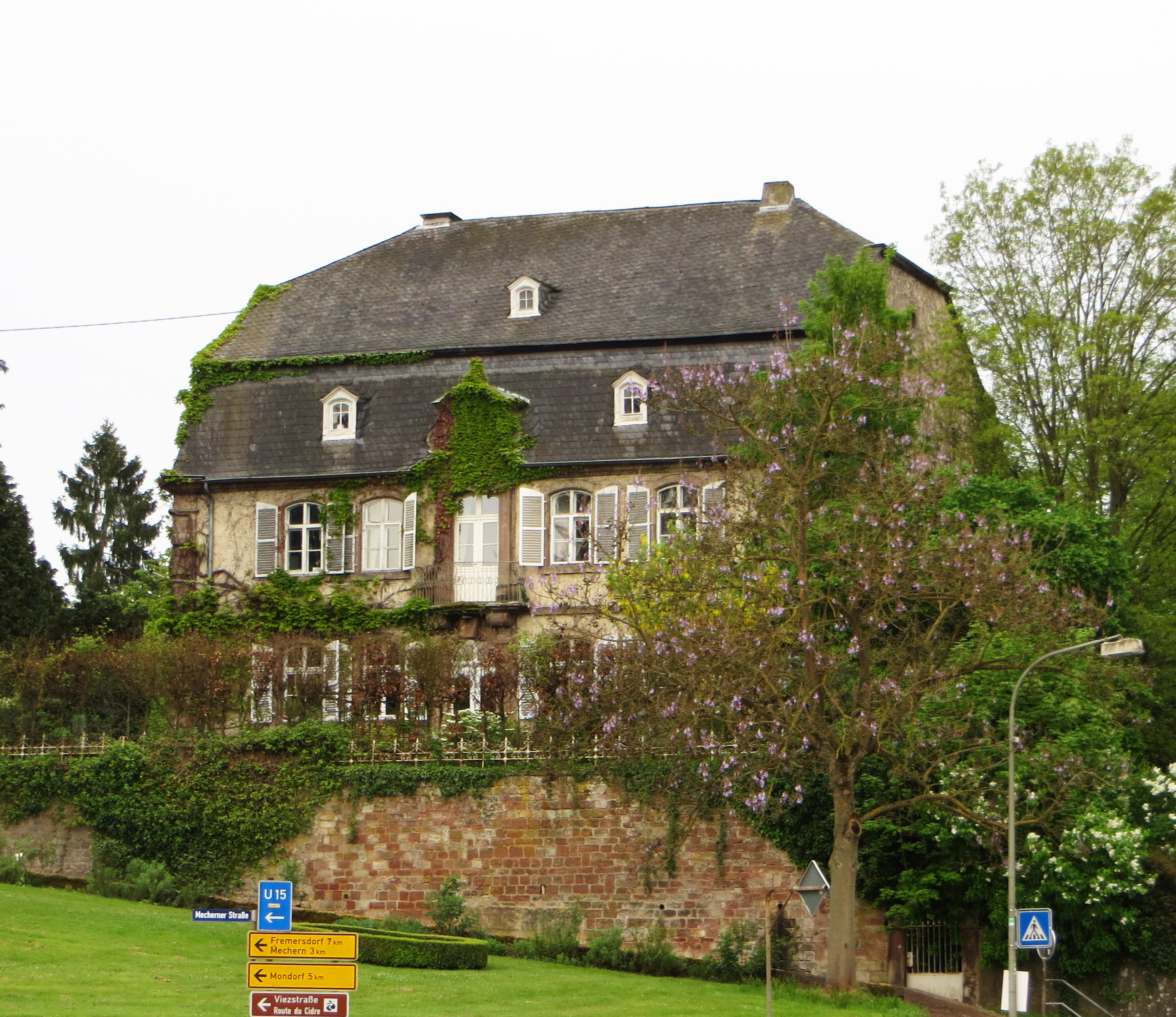 Schloss Hilbringen, Barockbau errichtet den Jahren 1745 bis 1755